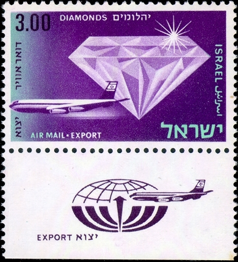 בול דואר אוויר ייצוא 1968